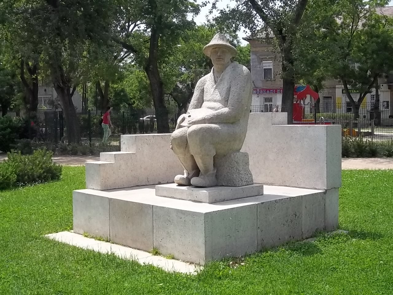 Nagy-Balogh János szobra (Martsa István, 1975) a kispesti Templom téren (Budapest)